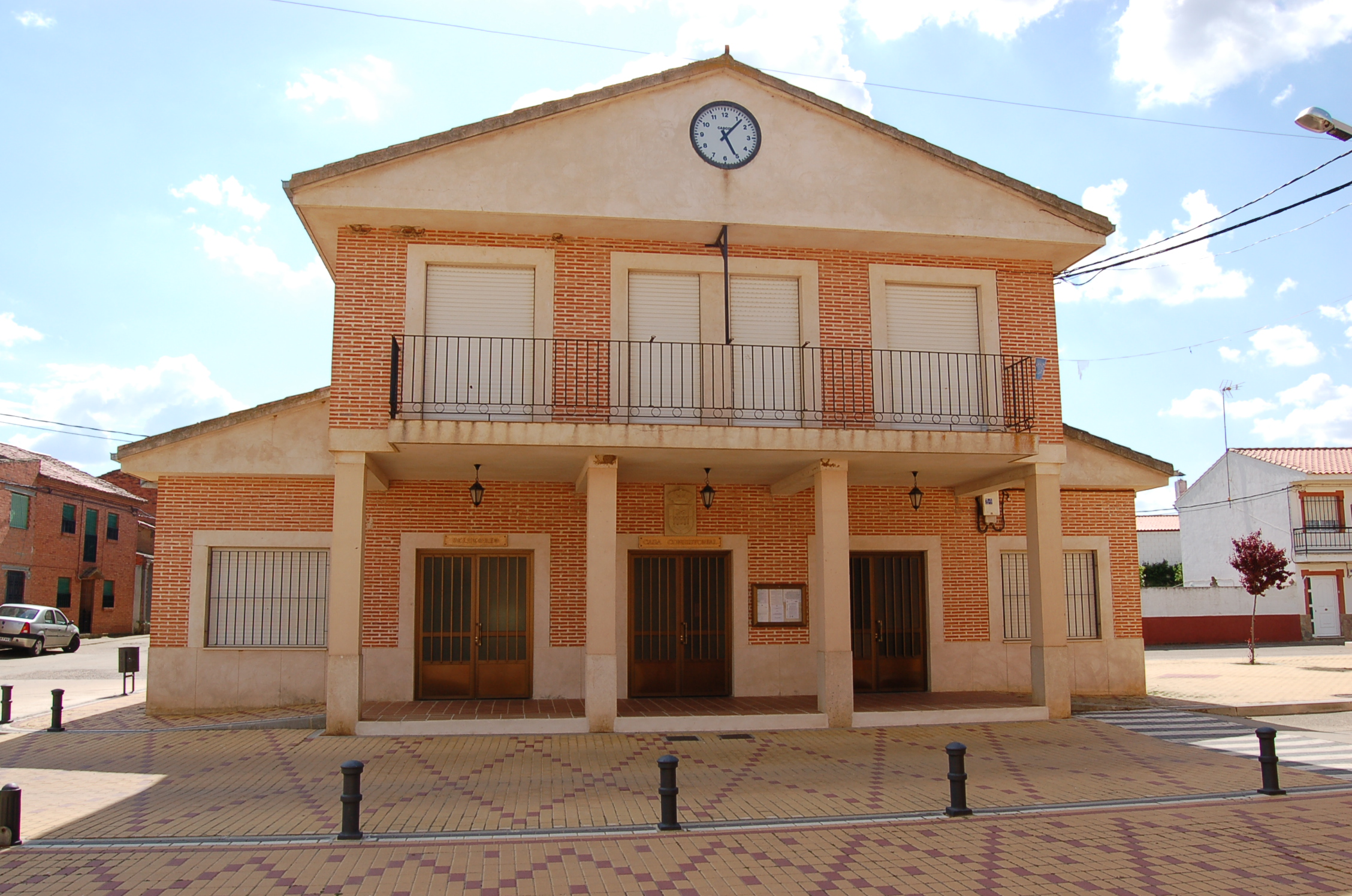 Casa consistorial Arcos de la Polvorosa